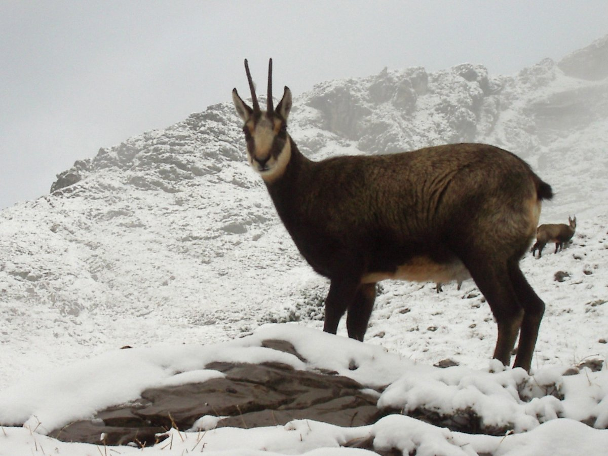 Gämsen am Nebelhorn